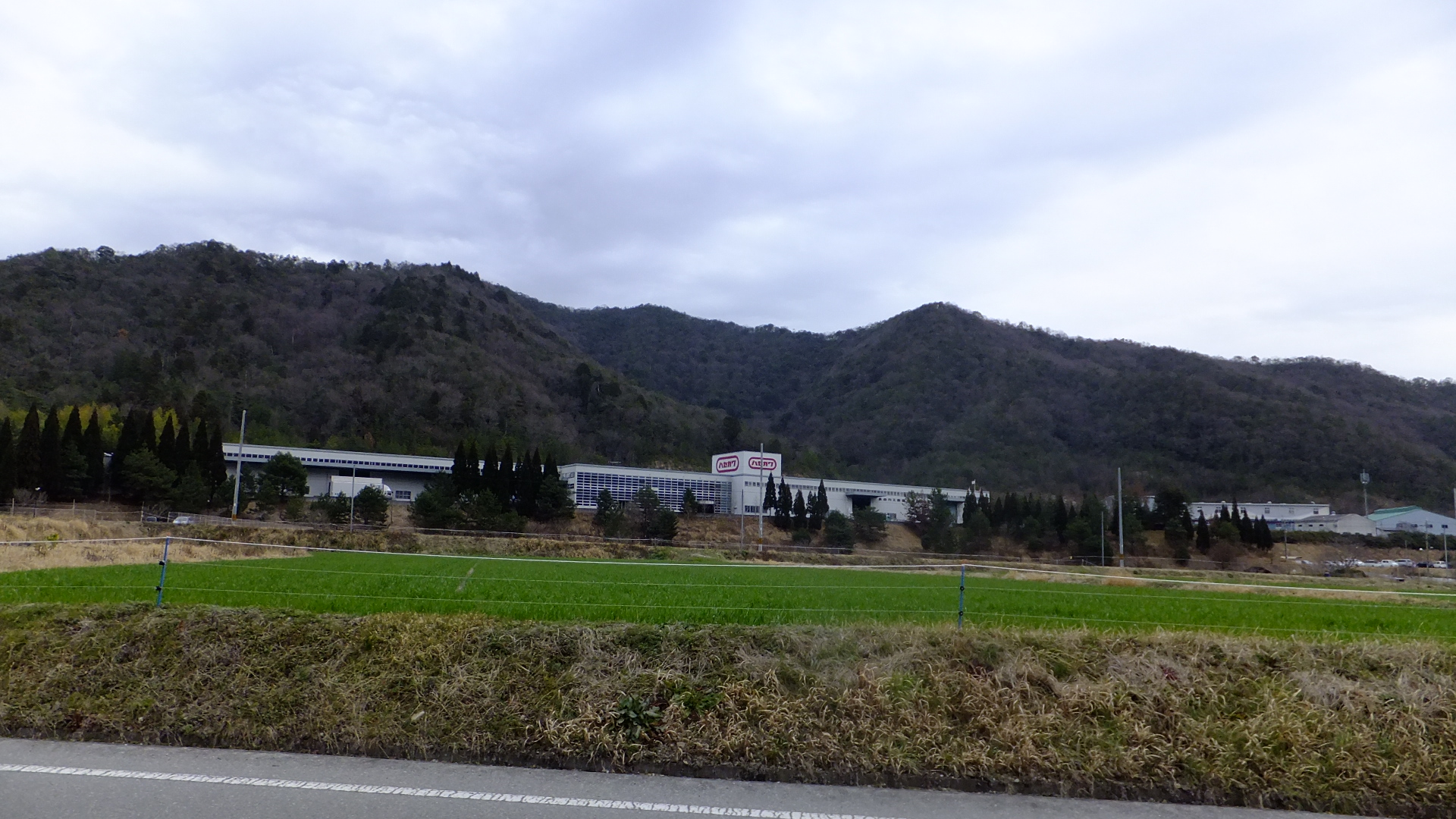 長谷川工業西脇工場